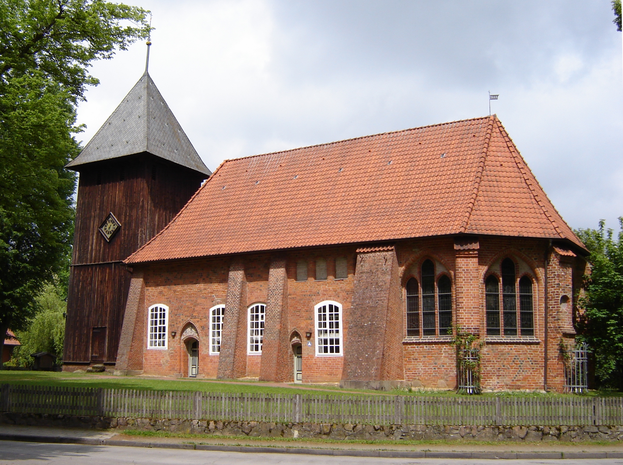 Kirche in Müden/Örtze (Niedersachsen)